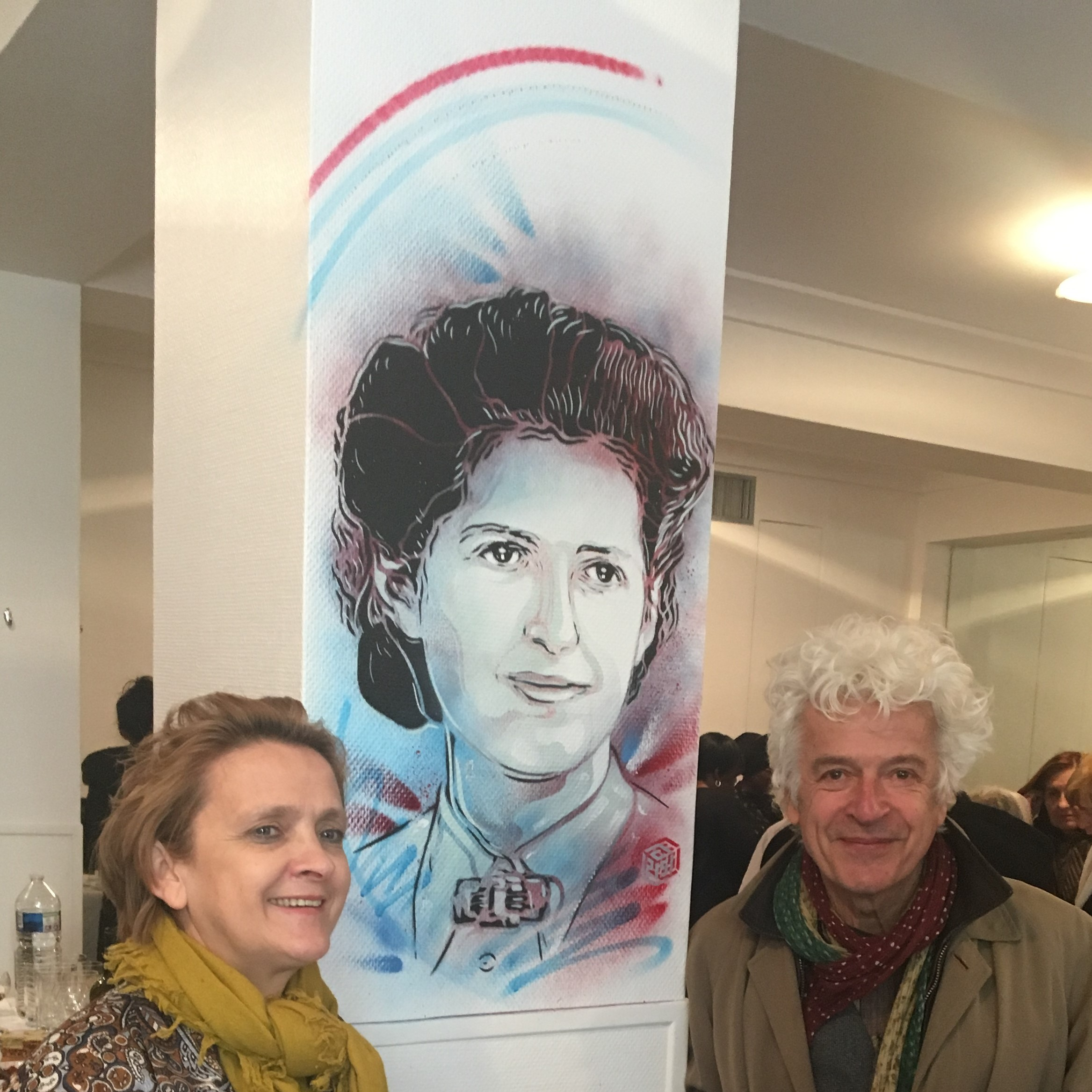 Madame Berthout, maire du 5ème arrondissement de Paris Monsieur François Marie De Gaulle-Anthonioz